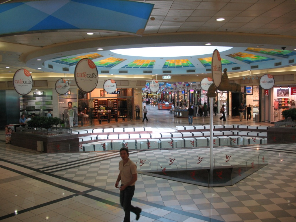 קניון איילון ברמת גן